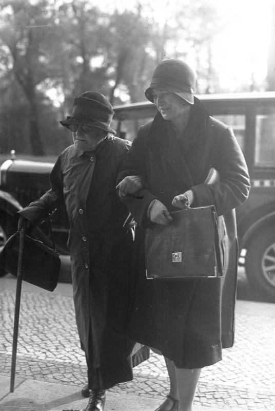 Die Wahl des Reichstagspräsidenten in Berlin! Aufnahmen prominenter Parlamentarier auf dem Wege zum Reichstag zur Wahl des Reichstagspräsidenten! Die kommunistische Abgeordnete Klara Zetkin auf dem Wege zum Reichstag.